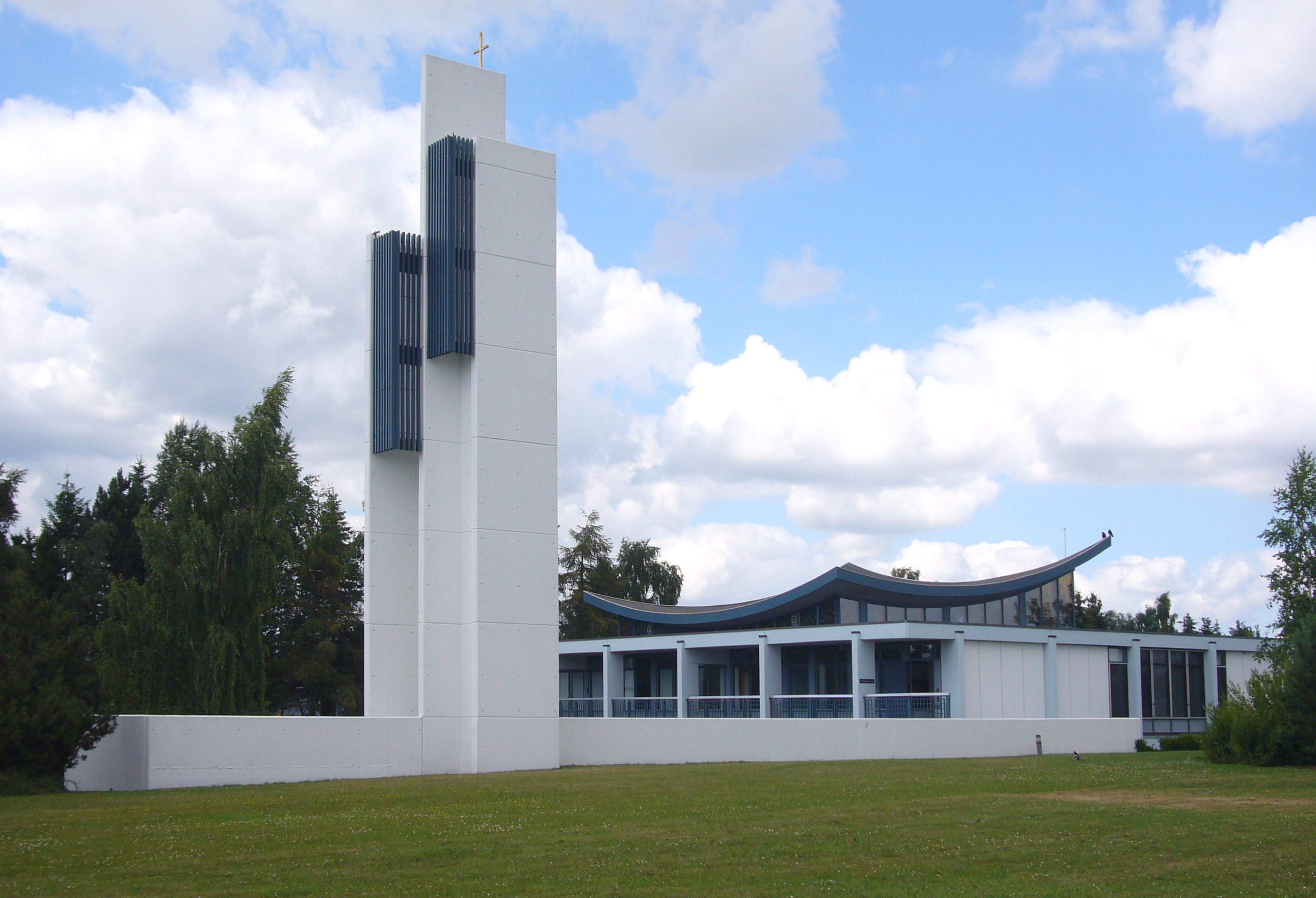 Mosede Kirke, Roskilde County, Denmark.